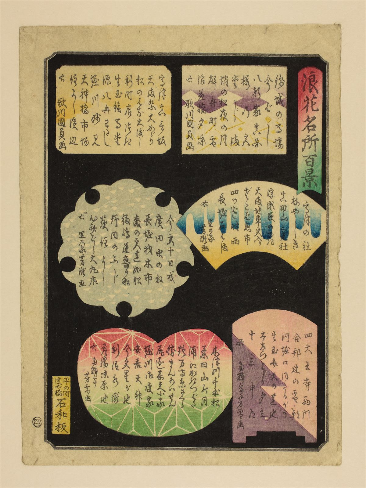 1800年代。歌川國員・里の家芳瀧・南粋亭芳雪/画 。浪花百景 102枚のうちの1枚、2枚の「もくじ」のうちの1枚。大阪市立中央図書館蔵。